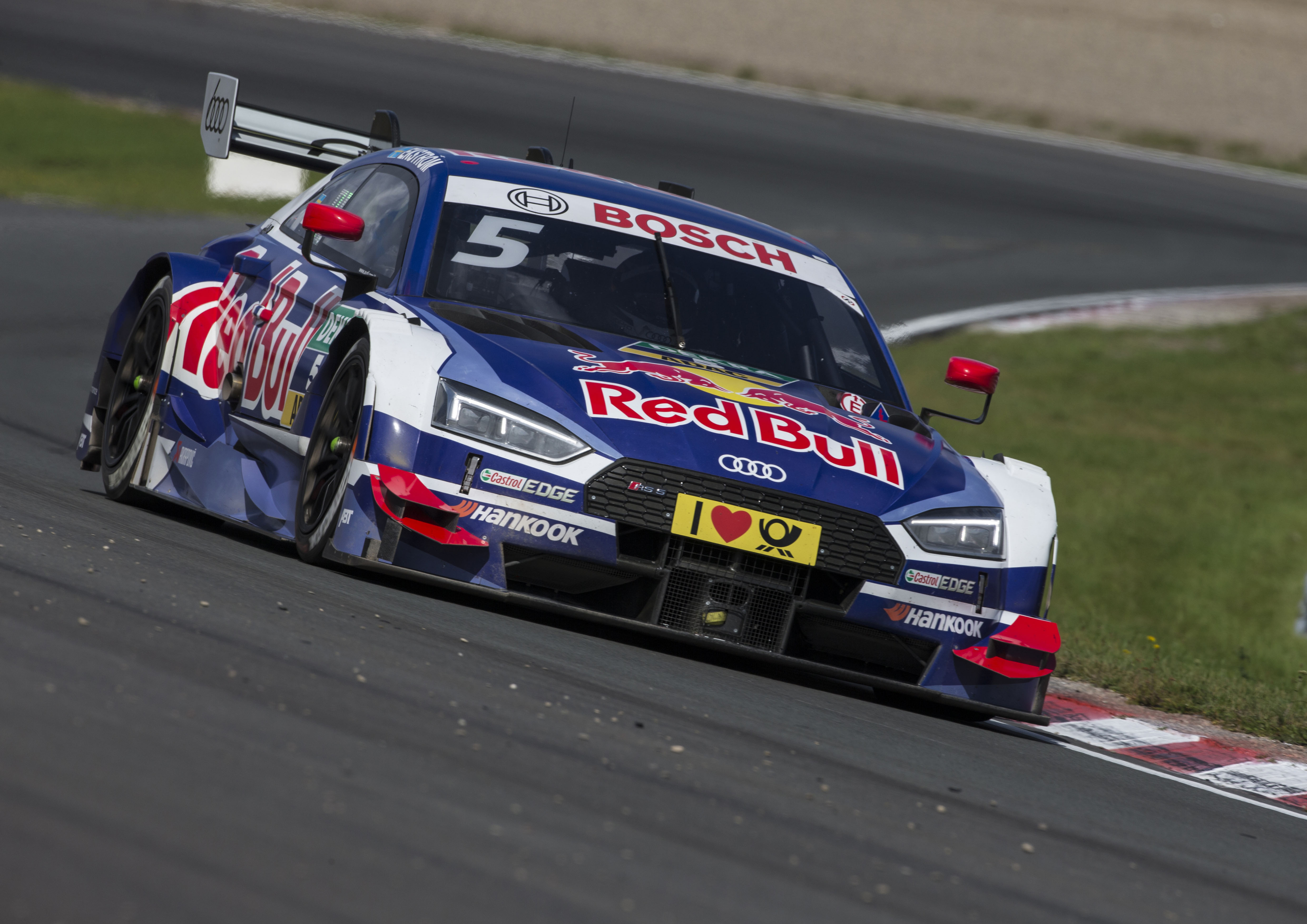 Mattias Ekström, Red Bull Audi RS 5 DTM, DTM Zandvoort 2017